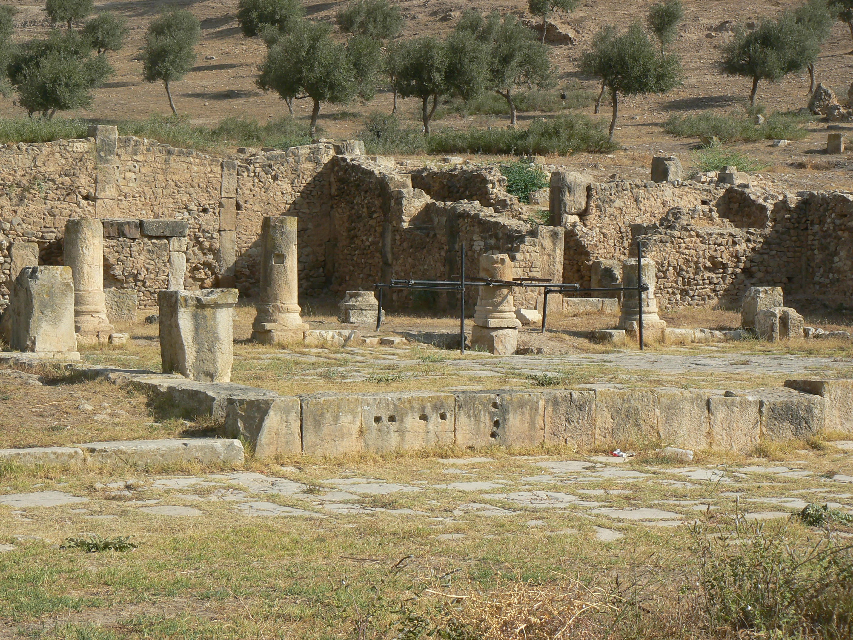 Temple d'Apollon du forum de Bulla Regia